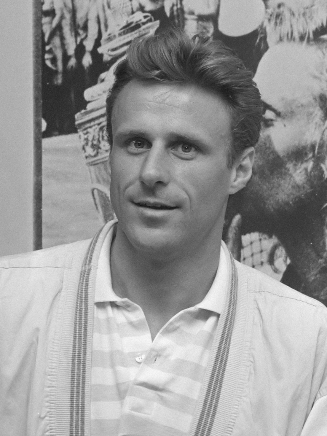 Bjorn Borg introduceert nieuwe after-shave in Bijenkorf Amsterdam 10 juni 1987